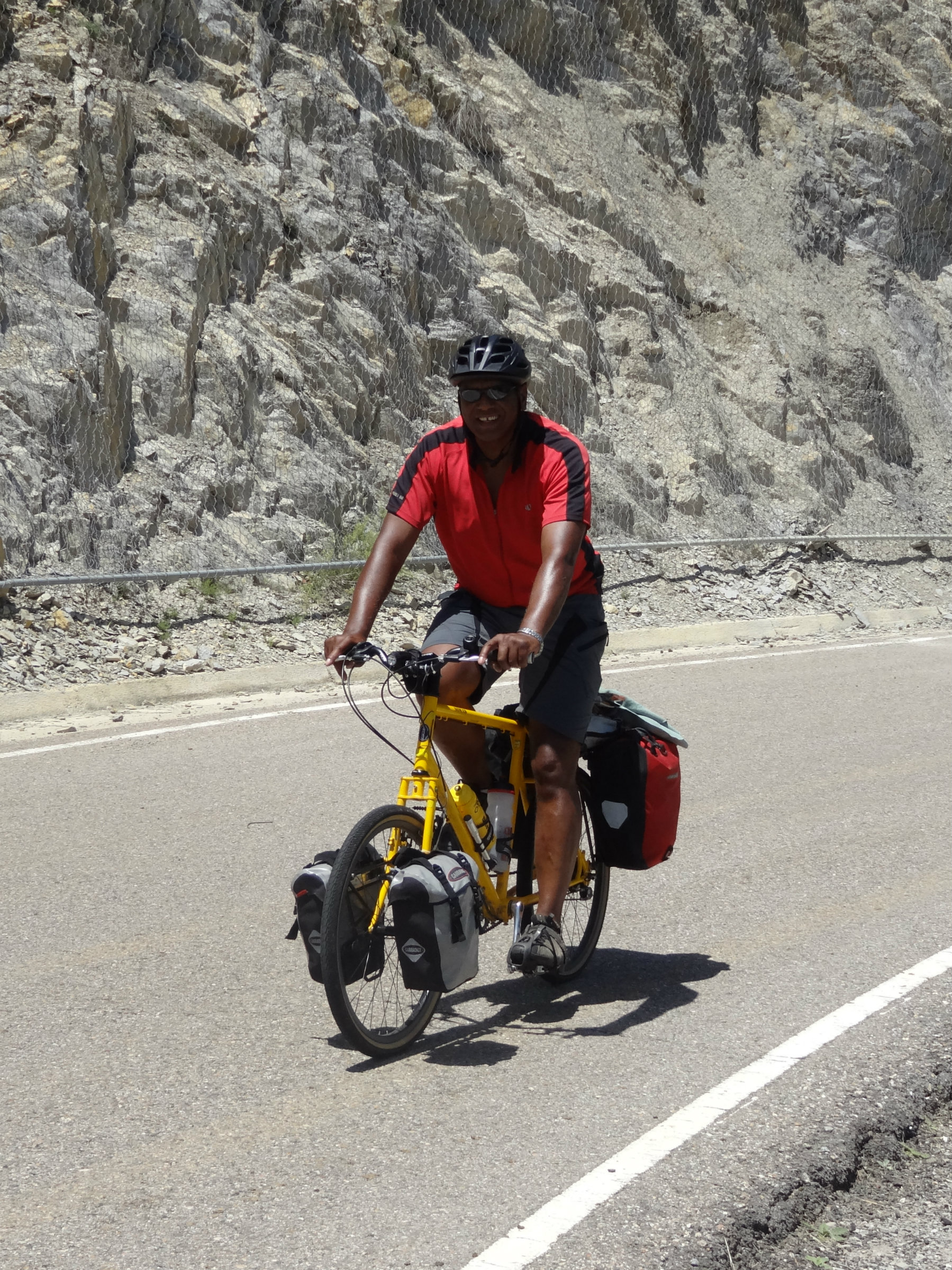 Coll de Bóixols